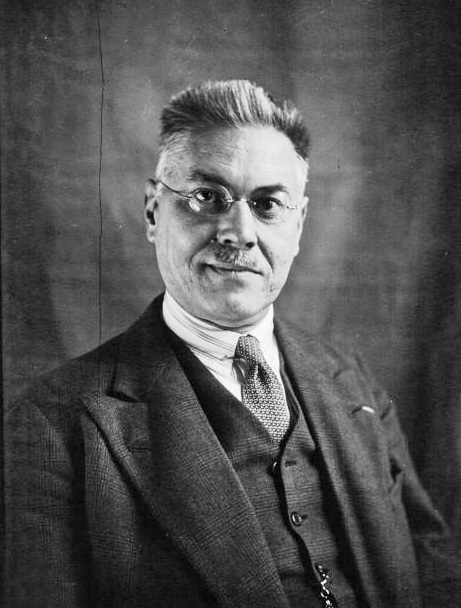 Médard Brogly, député du Haut Rhin : photographie de presse